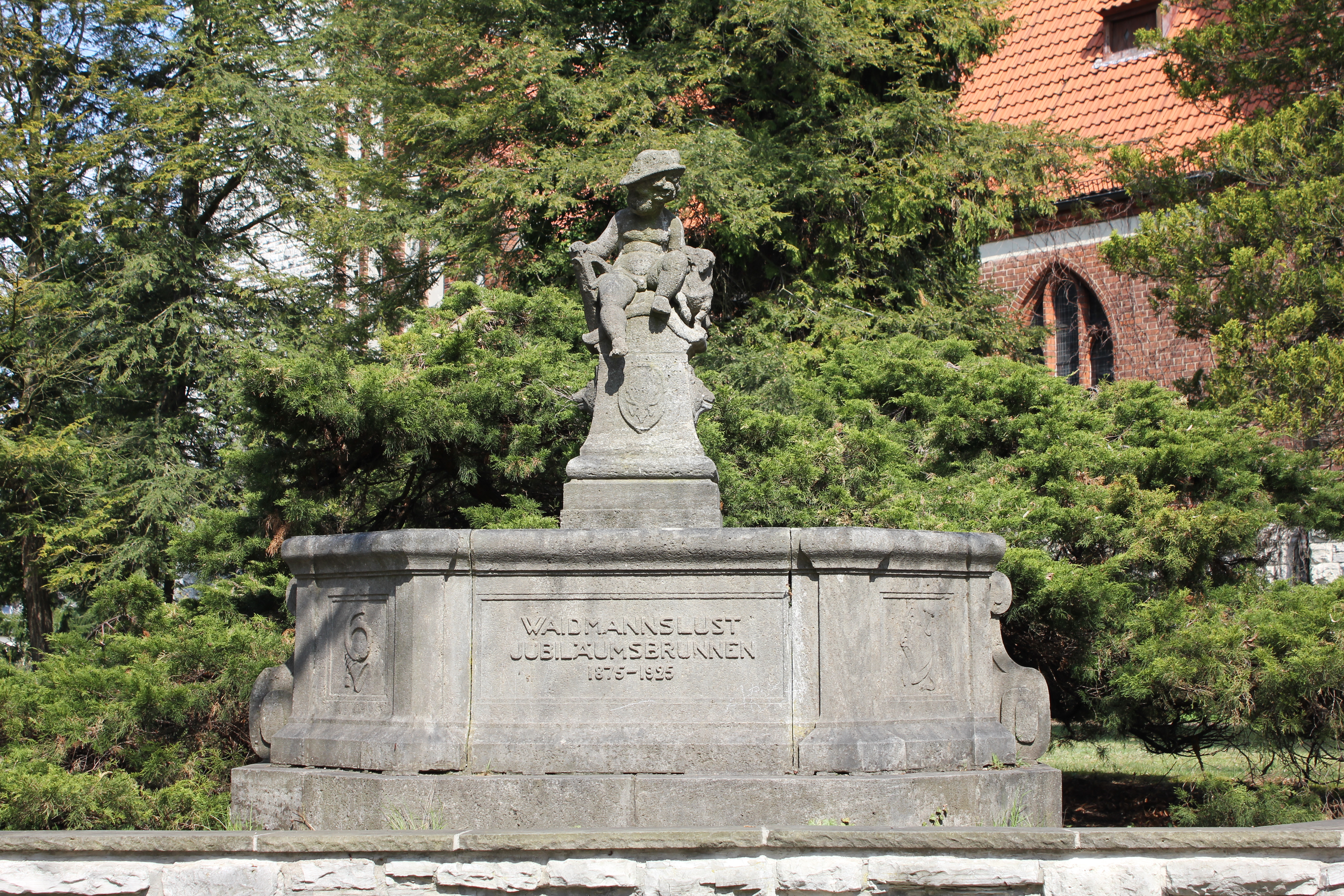 Jubiläumsbrunnen vor der Evangelischen Königin-Luise-Kirche